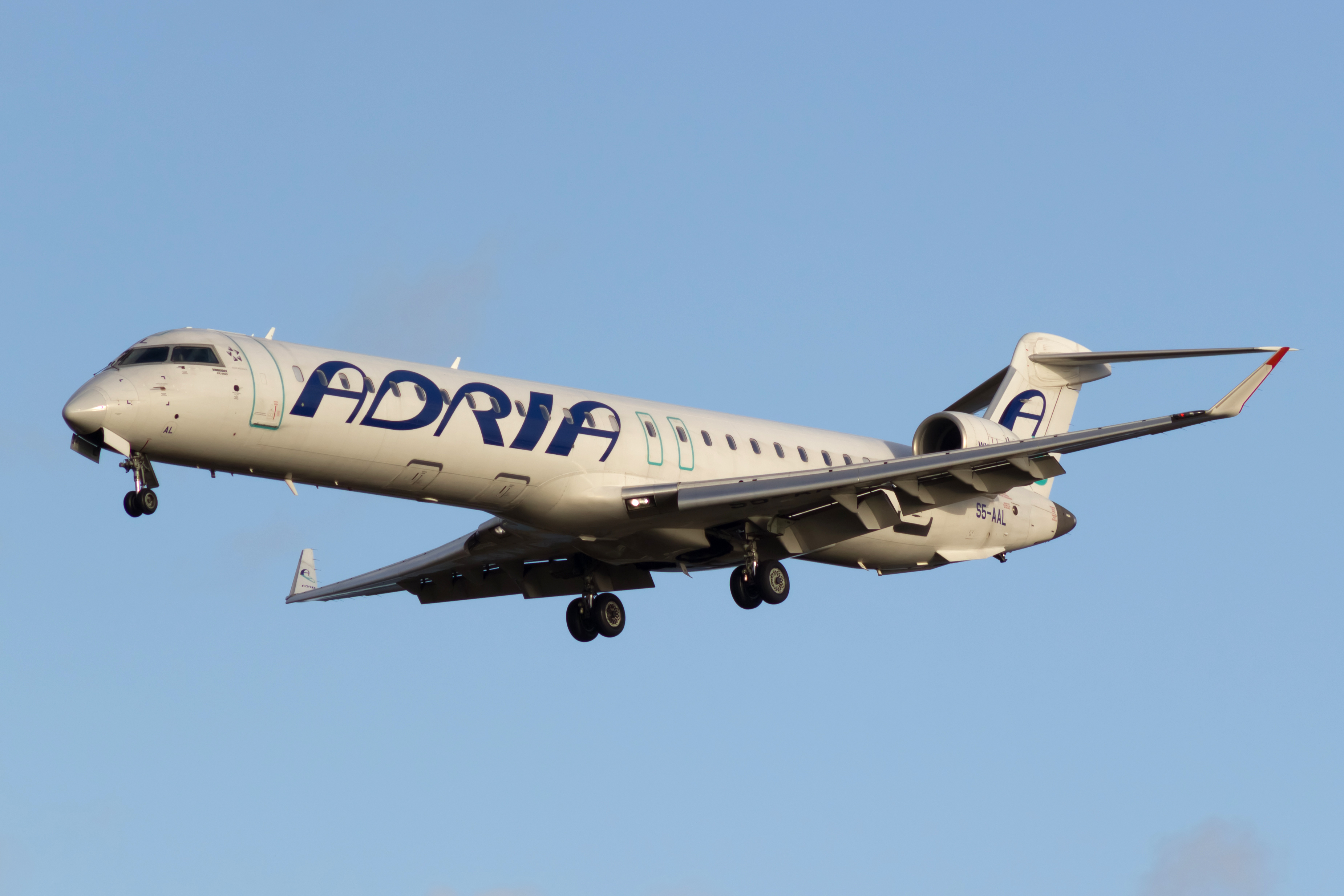 CRJ900 de Adria Airways aterrando no aeroporto de Copenhague.